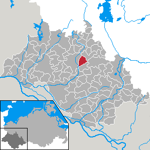 Kirch Jesar in Mecklenburg-Vorpommern - district Ludwigslust